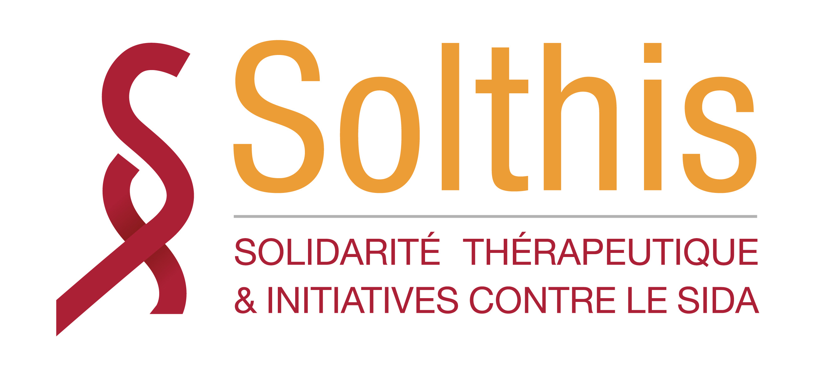 Logo de l'association SOLTHIS